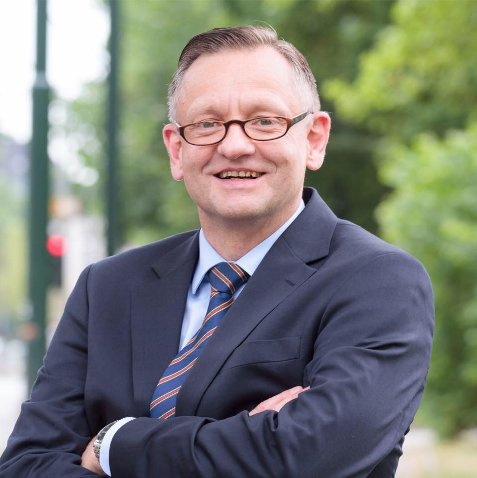 Kay Gottschalk, Portrait